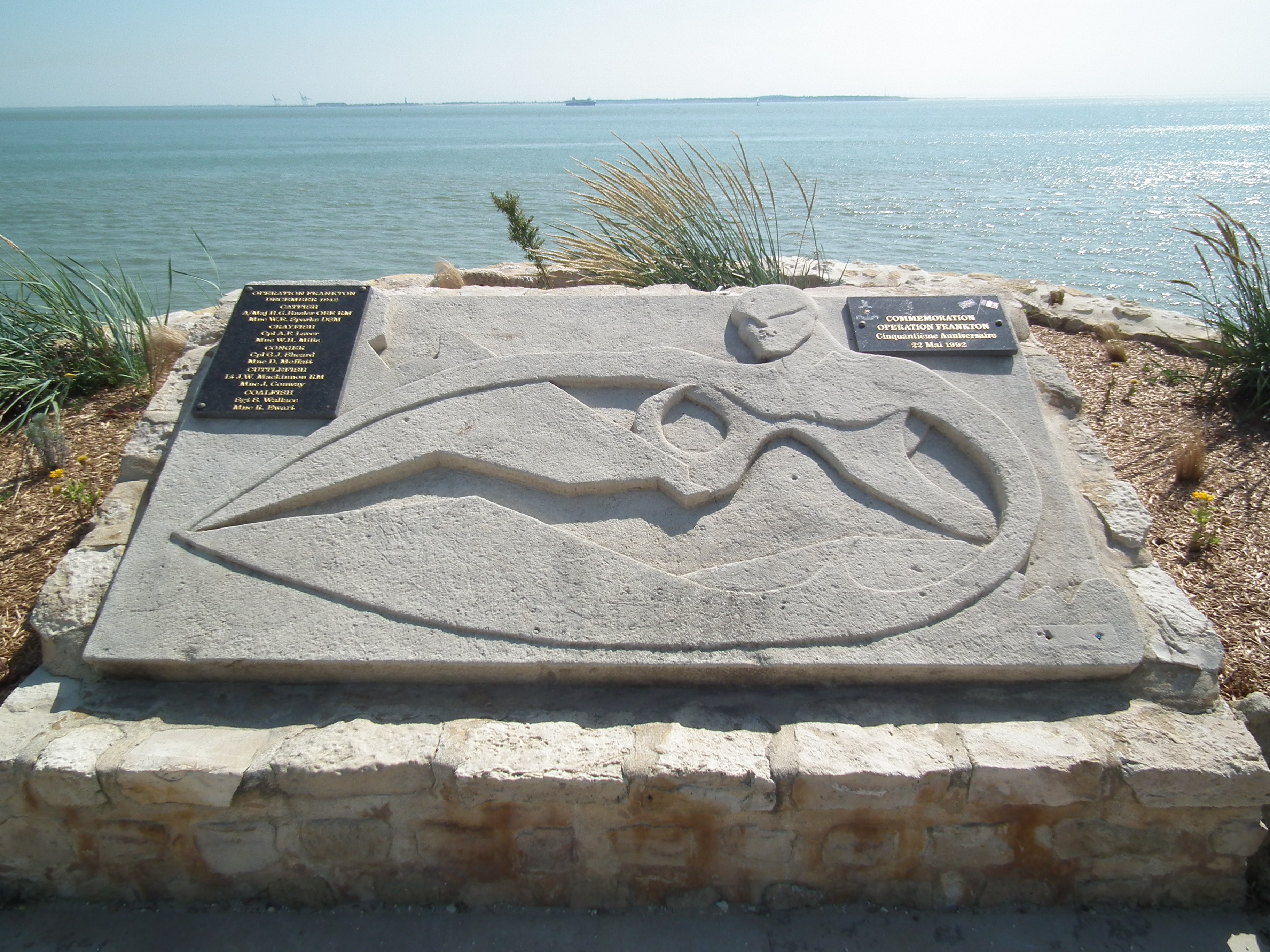 Monument commémoratif - opération Frankton, Saint-Georges-de-Didonne, scuplture (1992) : Eric Picard